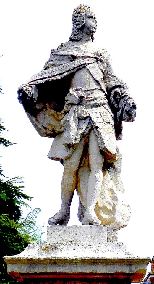 Fotografía tomada en el otoño de 2014 tratada digitalmente como imagen acuarelada.